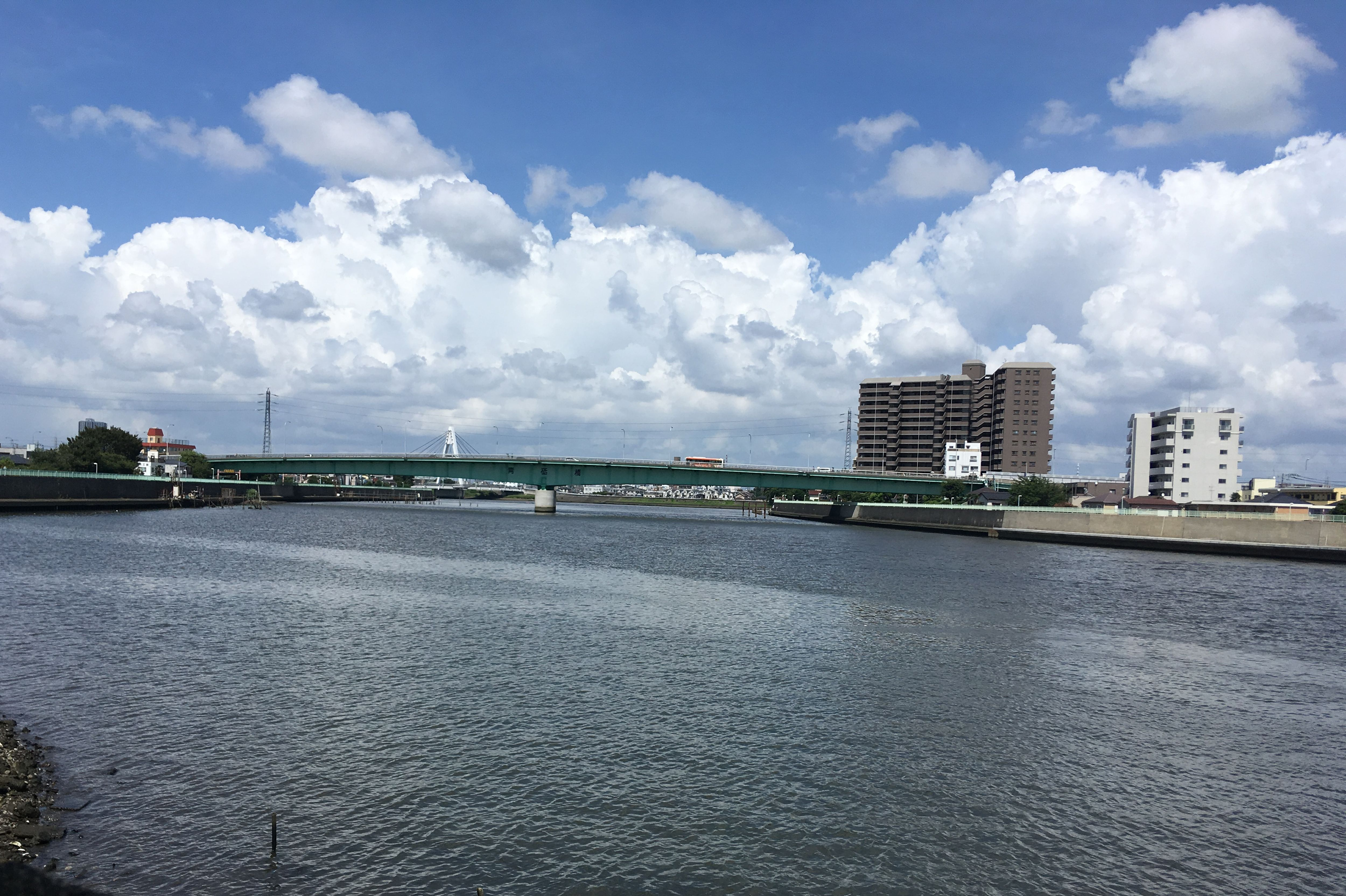 東京都葛飾区にある青砥橋。(2018年7月)